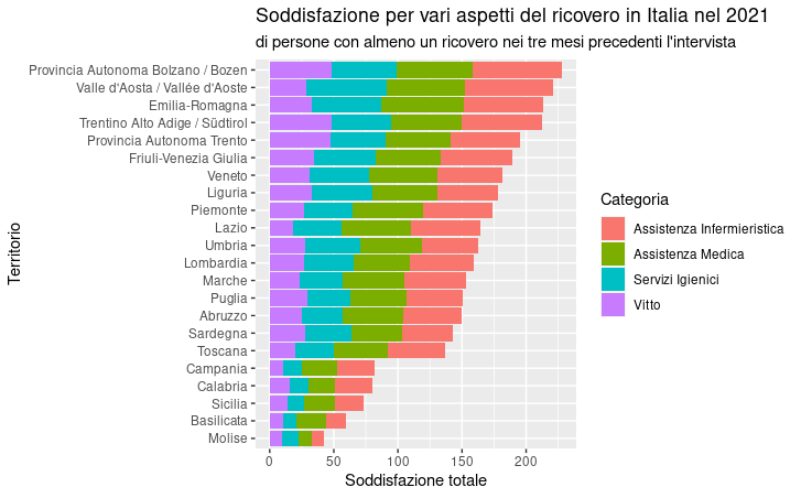 file realizzato con Rstudio con dati Istat